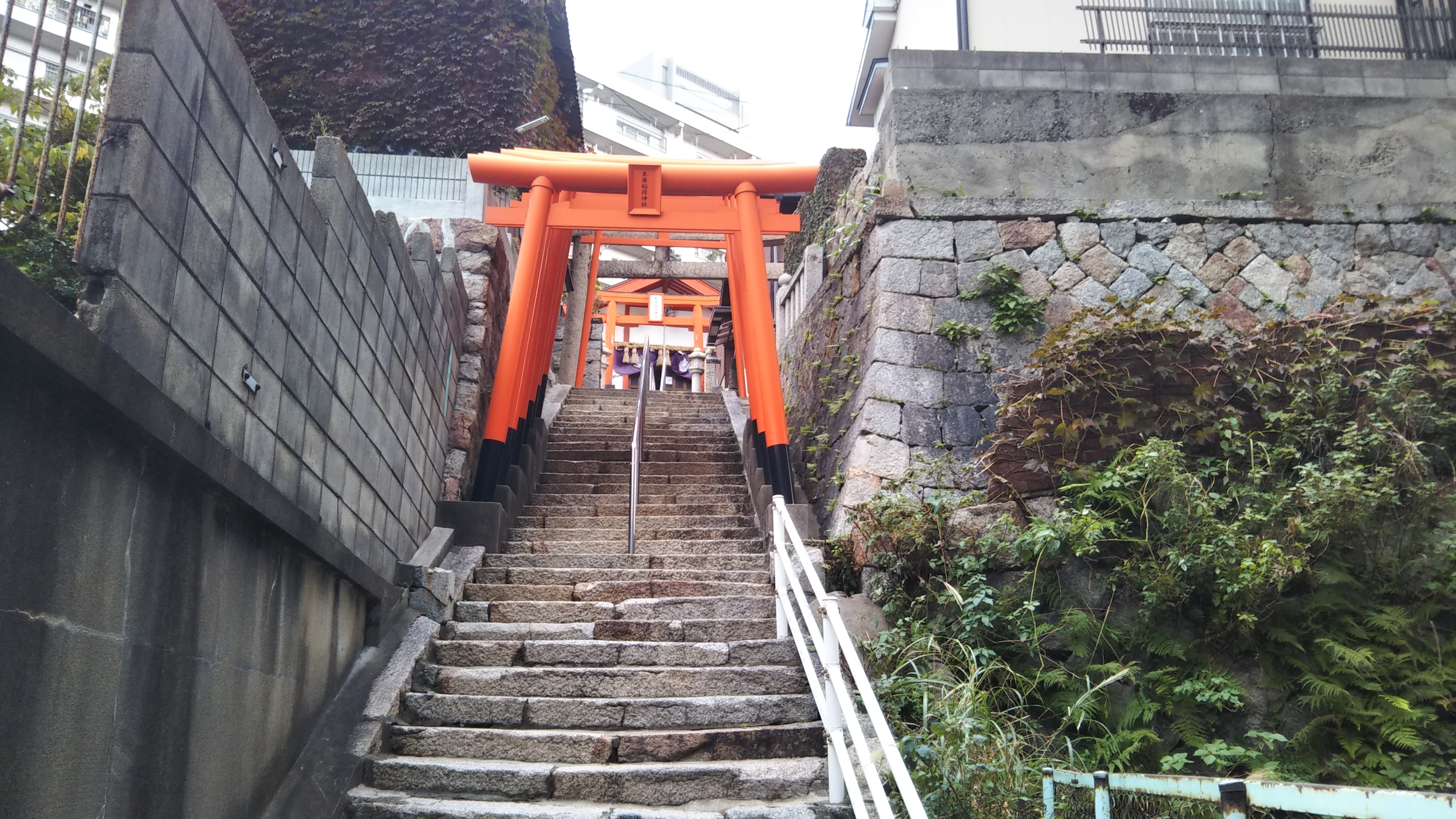 山口県下関市赤間町にある末広稲荷神社。2019年11月10日撮影。